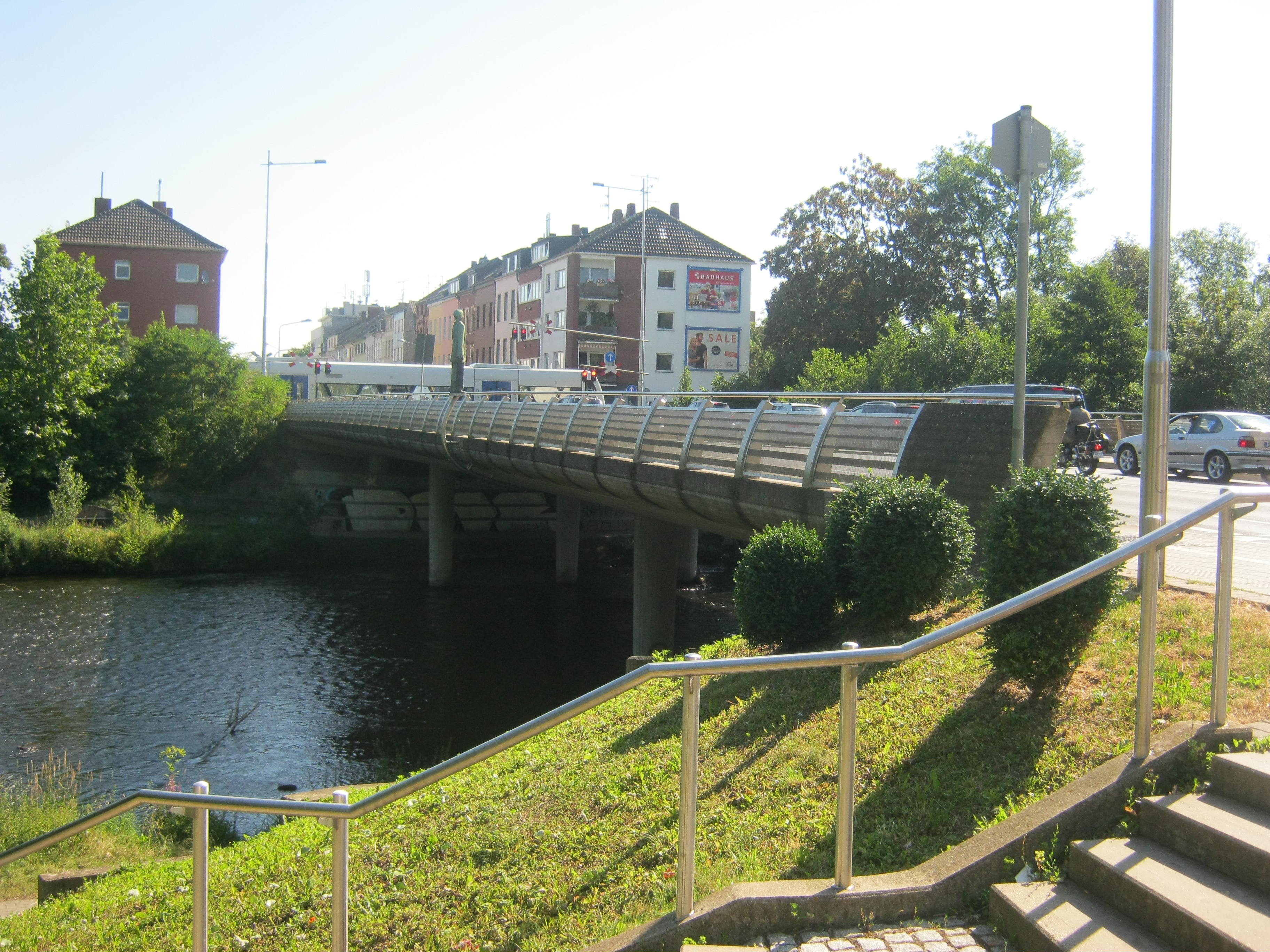 Johannesbrücke